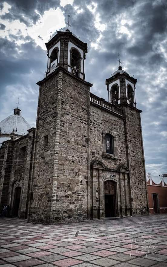 Tierra hermosa